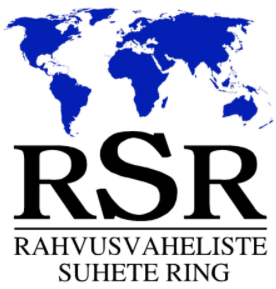 Rahvusvaheliste Suhete Ringi logo